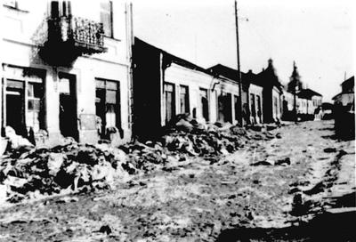 Drahomanov street. Ghetto in Lutsk 1942